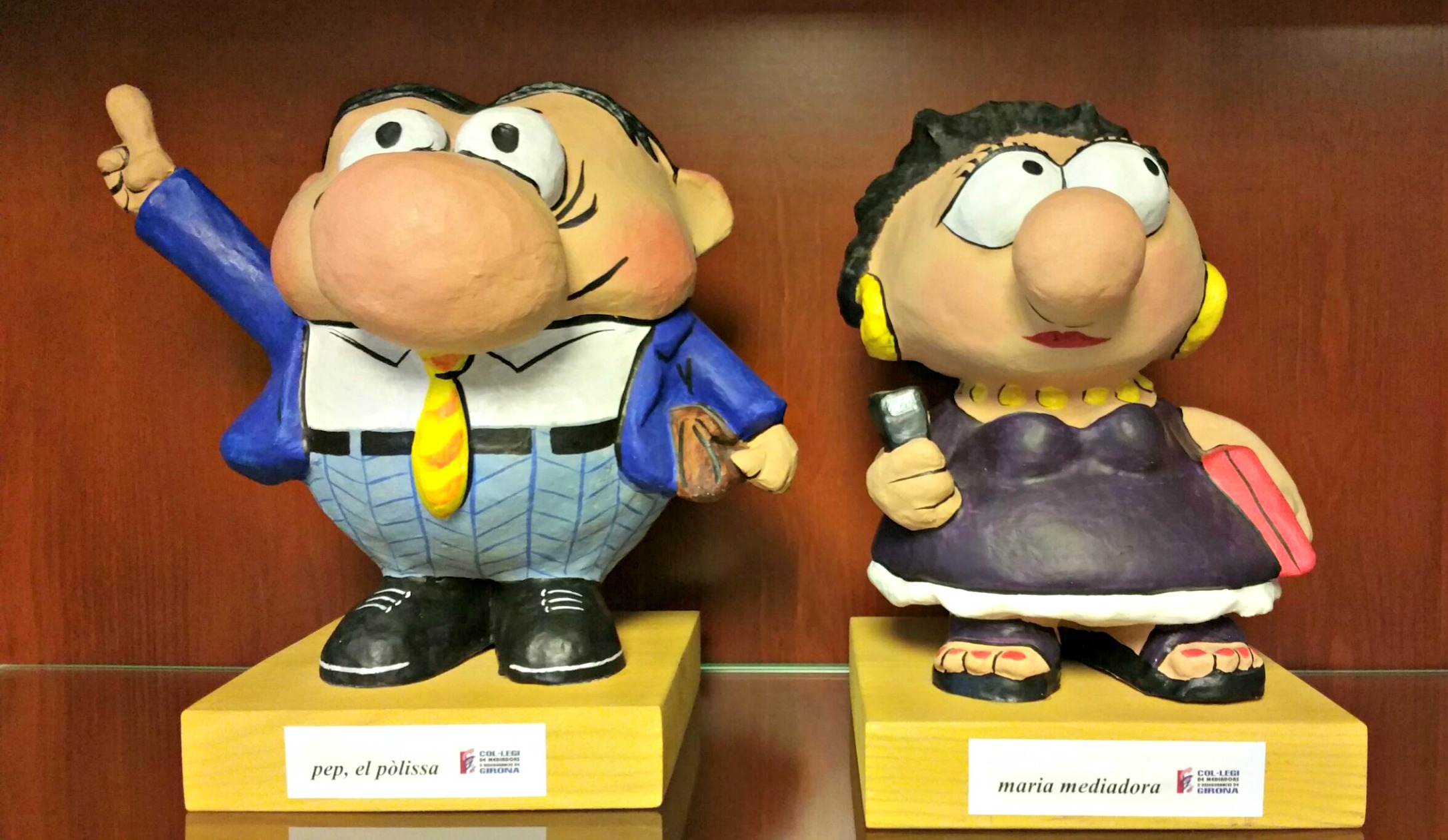 Pep Polissa i Maria Mediadora del Col·legi de Mediadors d'Assegurances de Girona, són les dos figures que representen a la entitat i que serveixen com a obsequi institucional.